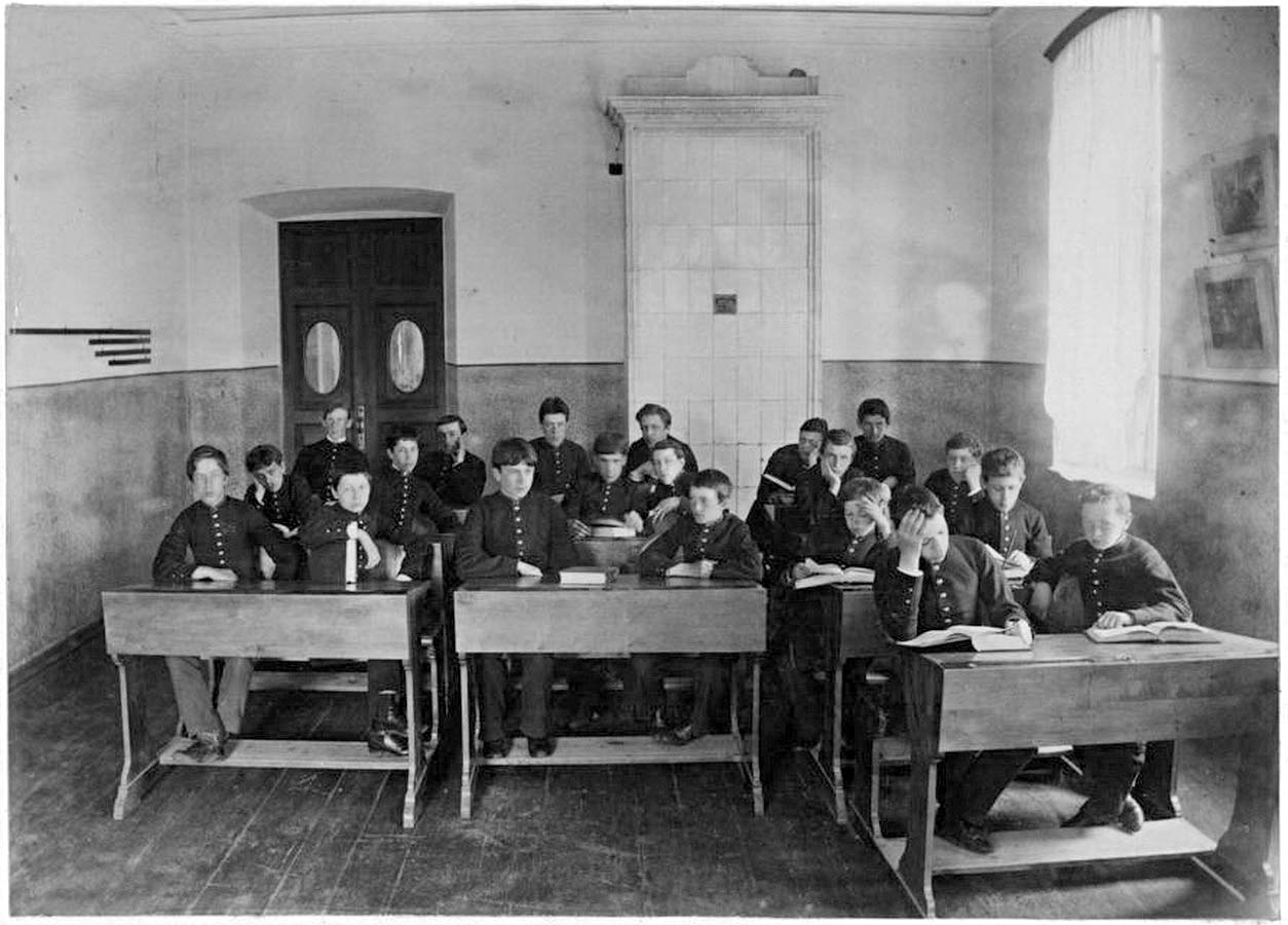 Классная комната тюменского Александровского реального училища во время учебного занятия